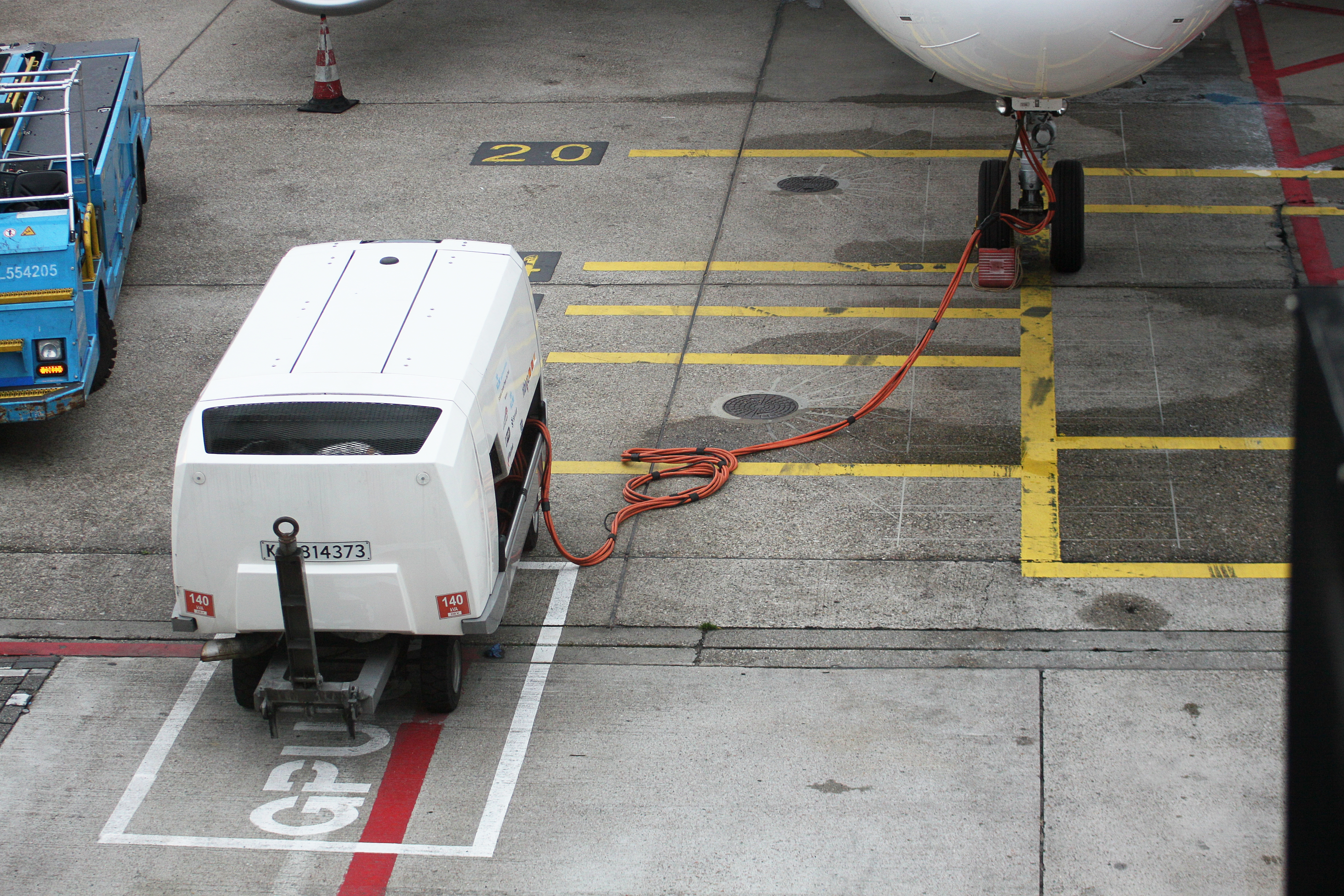 Flughafen Schiphol, Amsterdam; Ground Power Unit; Bodenaggregat zur Energieversorgung eines Flugzeuges am Boden